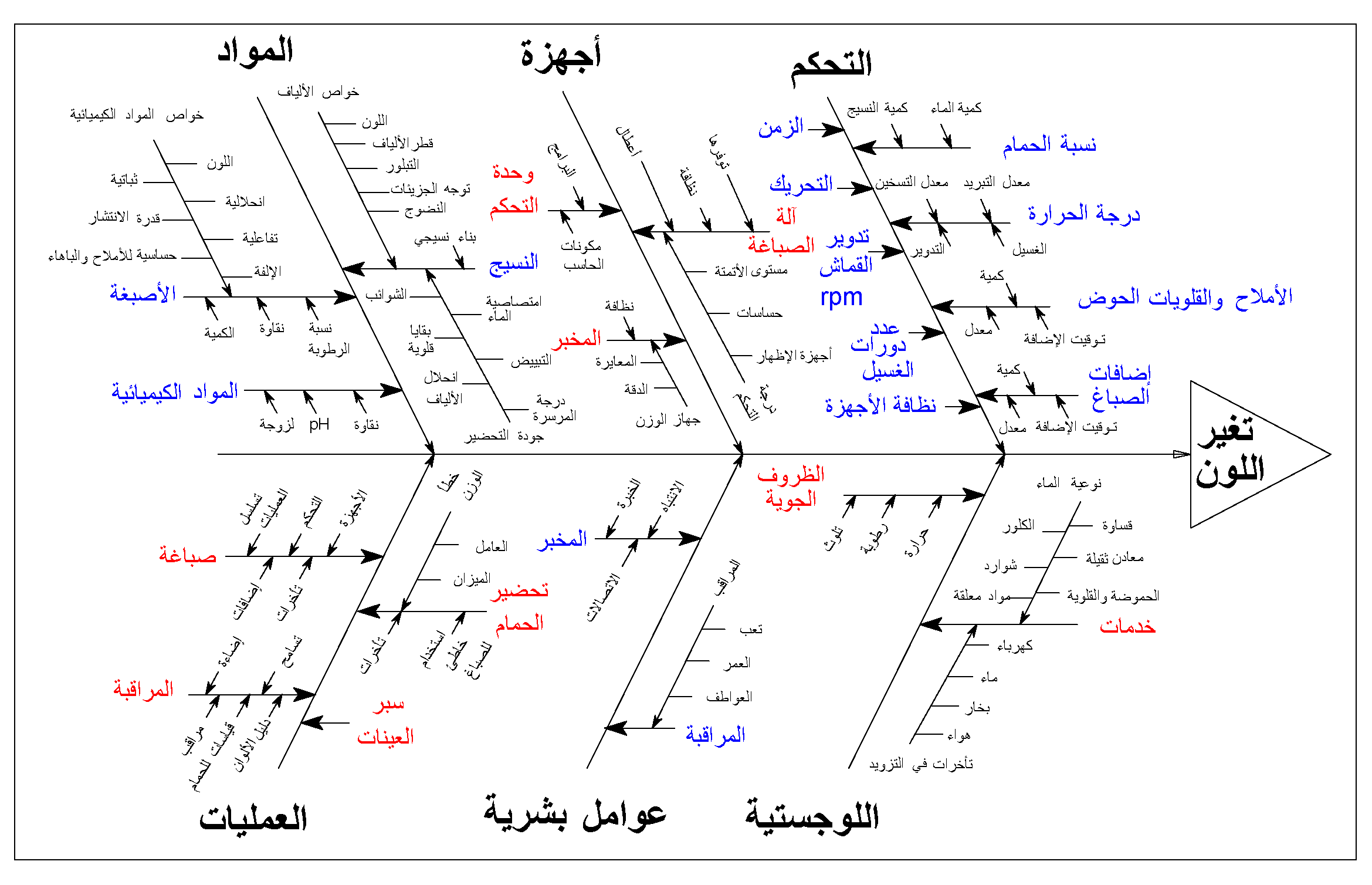 مخطط يوضح العدد الهائل من المتغيرات المؤثرة على لون المنتج المصبوغ النهائي.